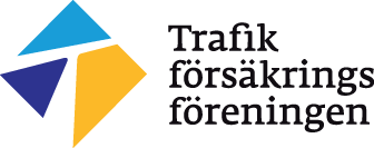 Logotyp Trafikförsäkringsföreningen